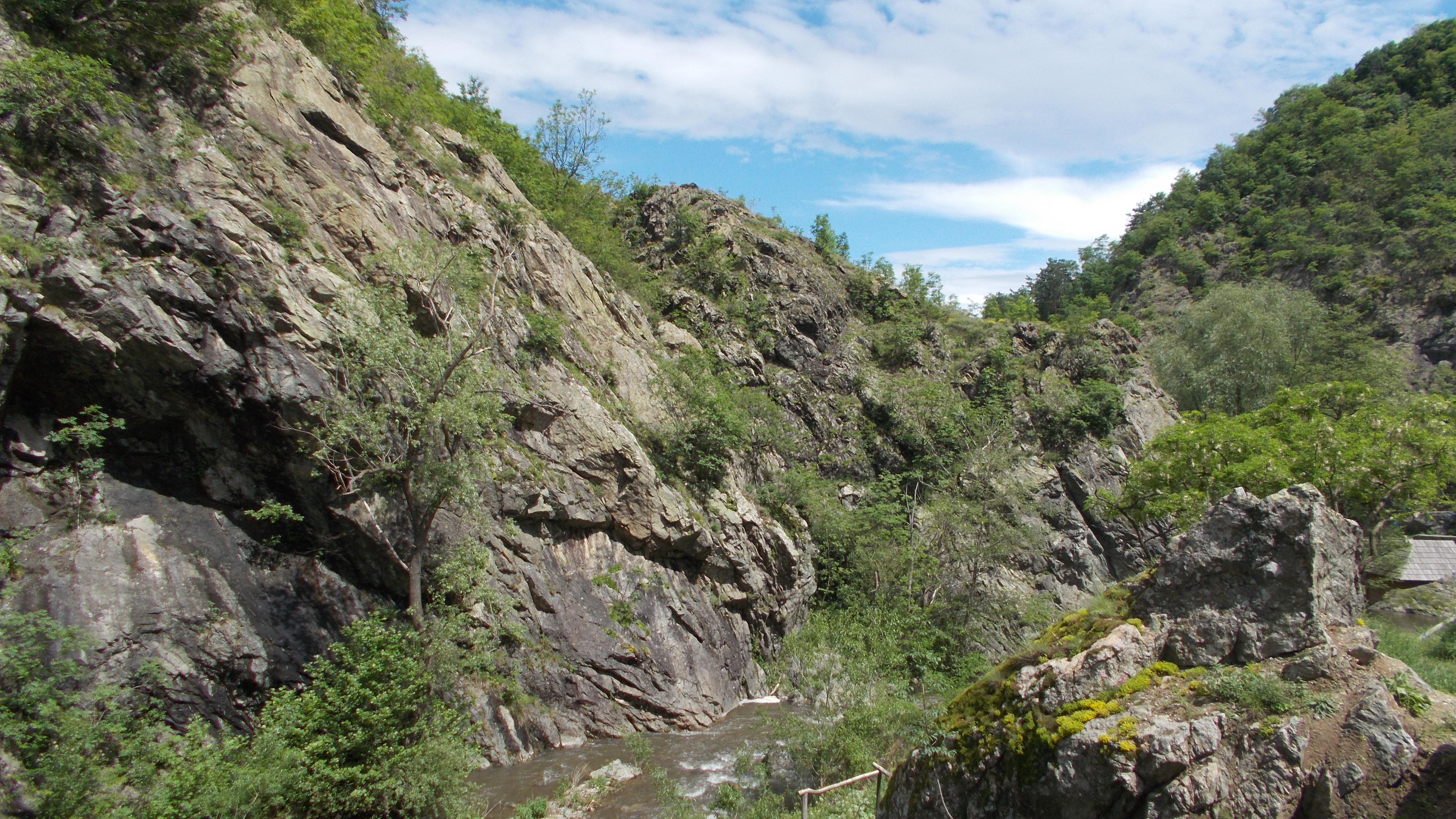 Rezervația naturală Cheile Rudăriei (20 mai 2019)